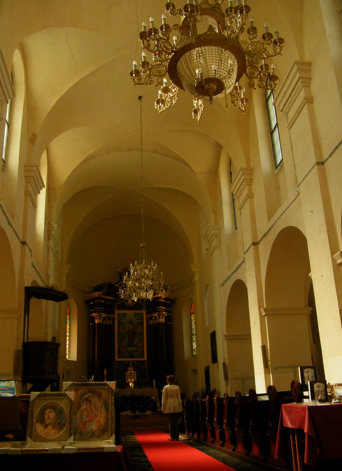 Беларуская (тарашкевіца): Комплекс Мікалаеўскага касьцёла:касьцёлбрама з агароджай і званіцайбудынак былых школы і шпіталя. г.п. Мір This is a photo of Belarusian heritage monument. Reference number: 411Г000319 ( WLM)